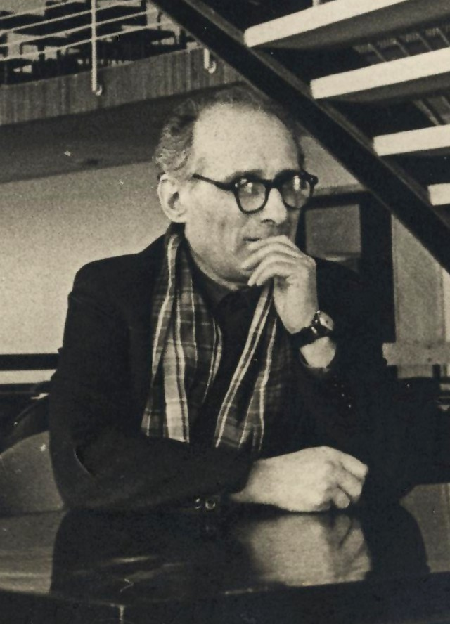 Кинохудожник Абрам Векслер